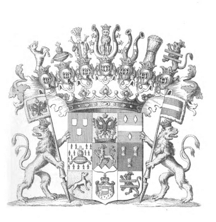 Wappen Schönborn Wiesentheid